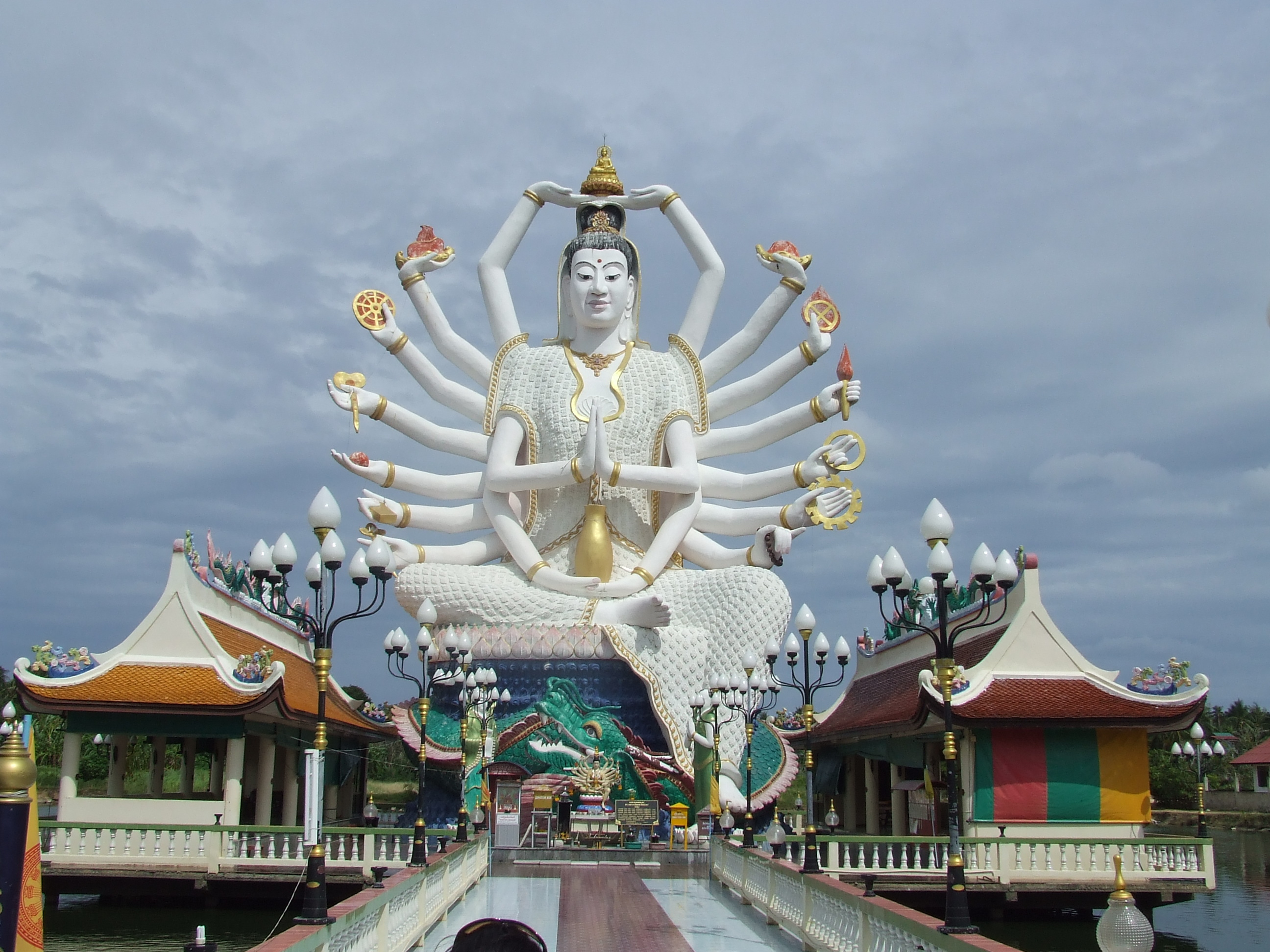 12 Armige Statue am Wat Plai Leam auf Ko Samui